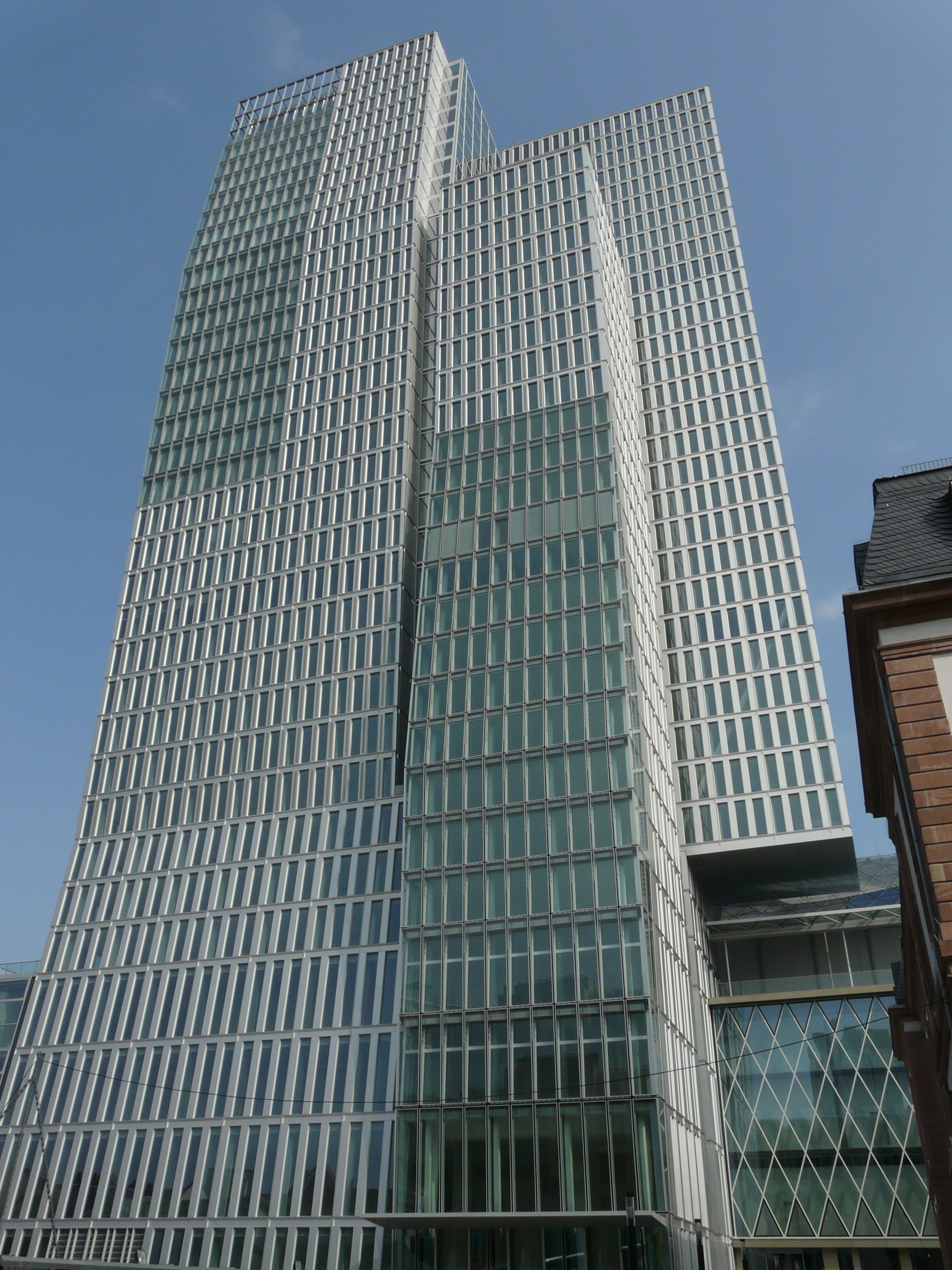 Bildinhalt: Der Nextower, Teil des Palais Quartier Aufnahmeort: Frankfurt am Main, Deutschland